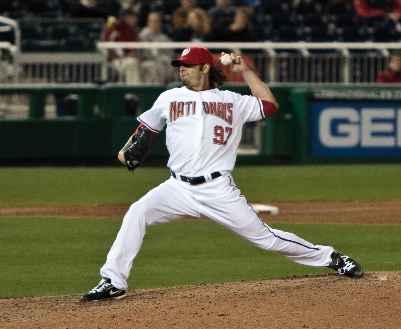 Joe Beimel